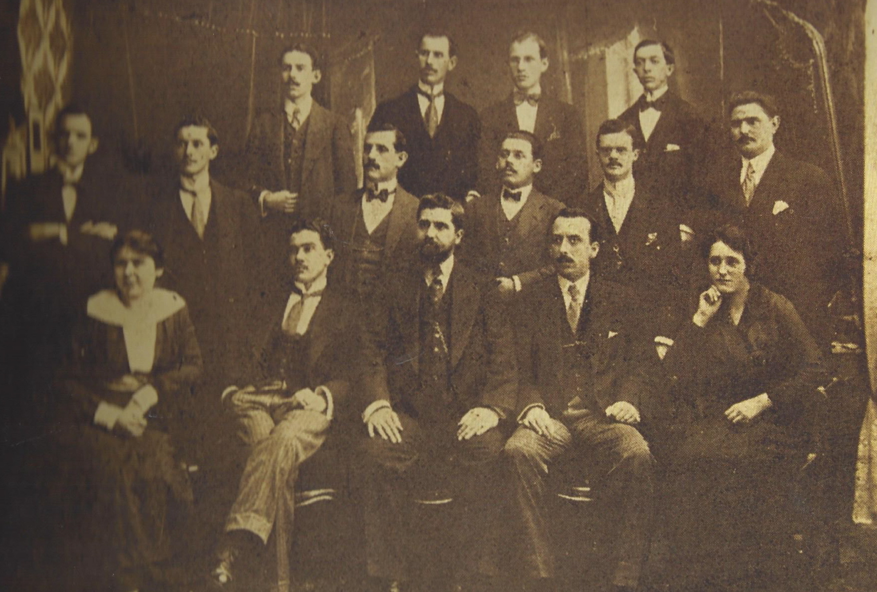 É uma foto de diversos professores da Escola de Odontologia e Farmácia que posteriormente seria incorporada à USP, tendo ao centro o professor Gustavo Pires de Andrade.